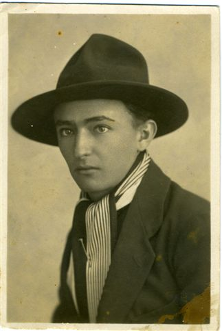 נחום איתן בצעירותו, במראה מסוגנן. התמונה באדיבות אורה ספיר.